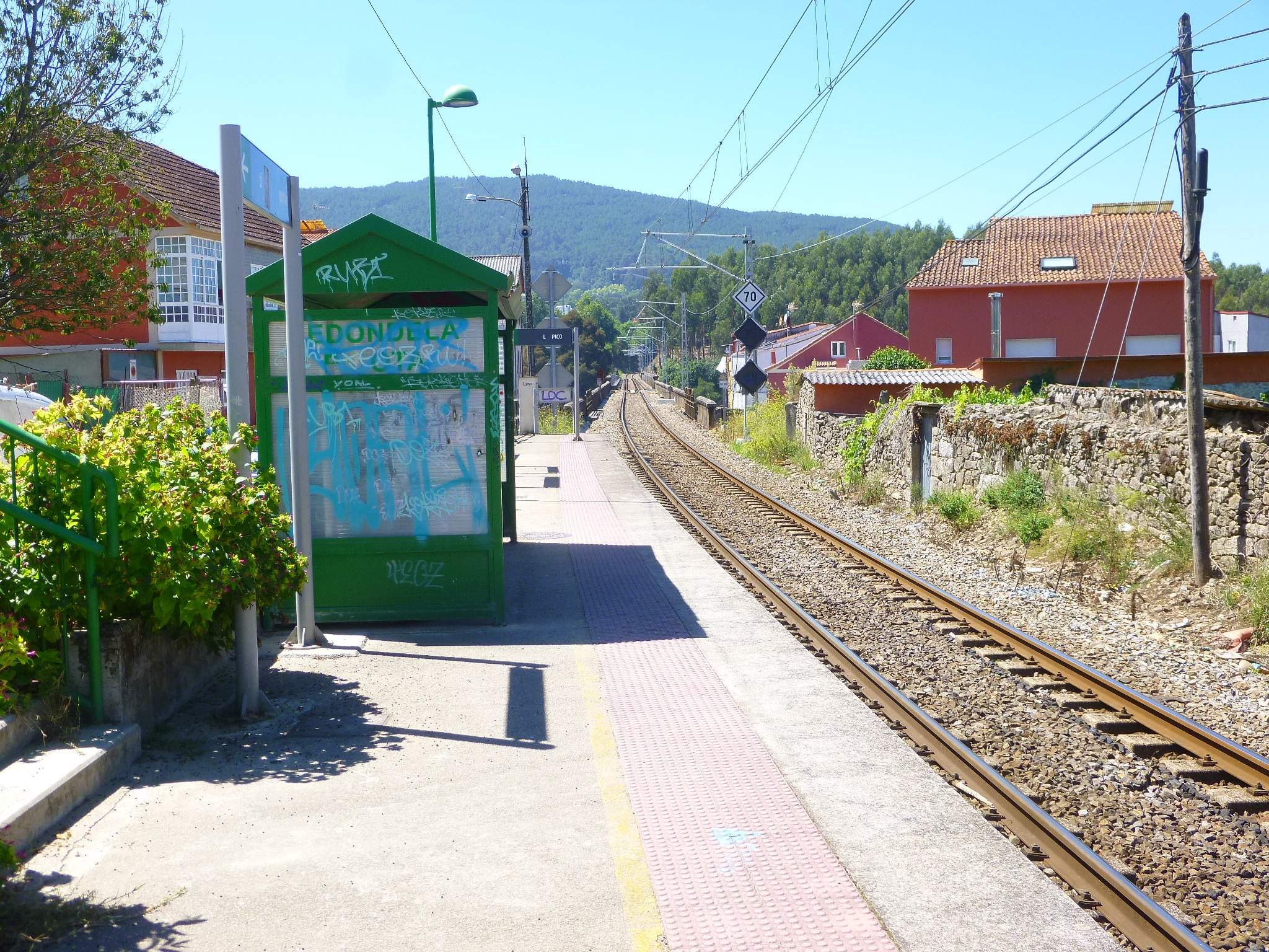 Estación de Redondela-Picota (Redondela, provincia de Pontevedra, Galicia).